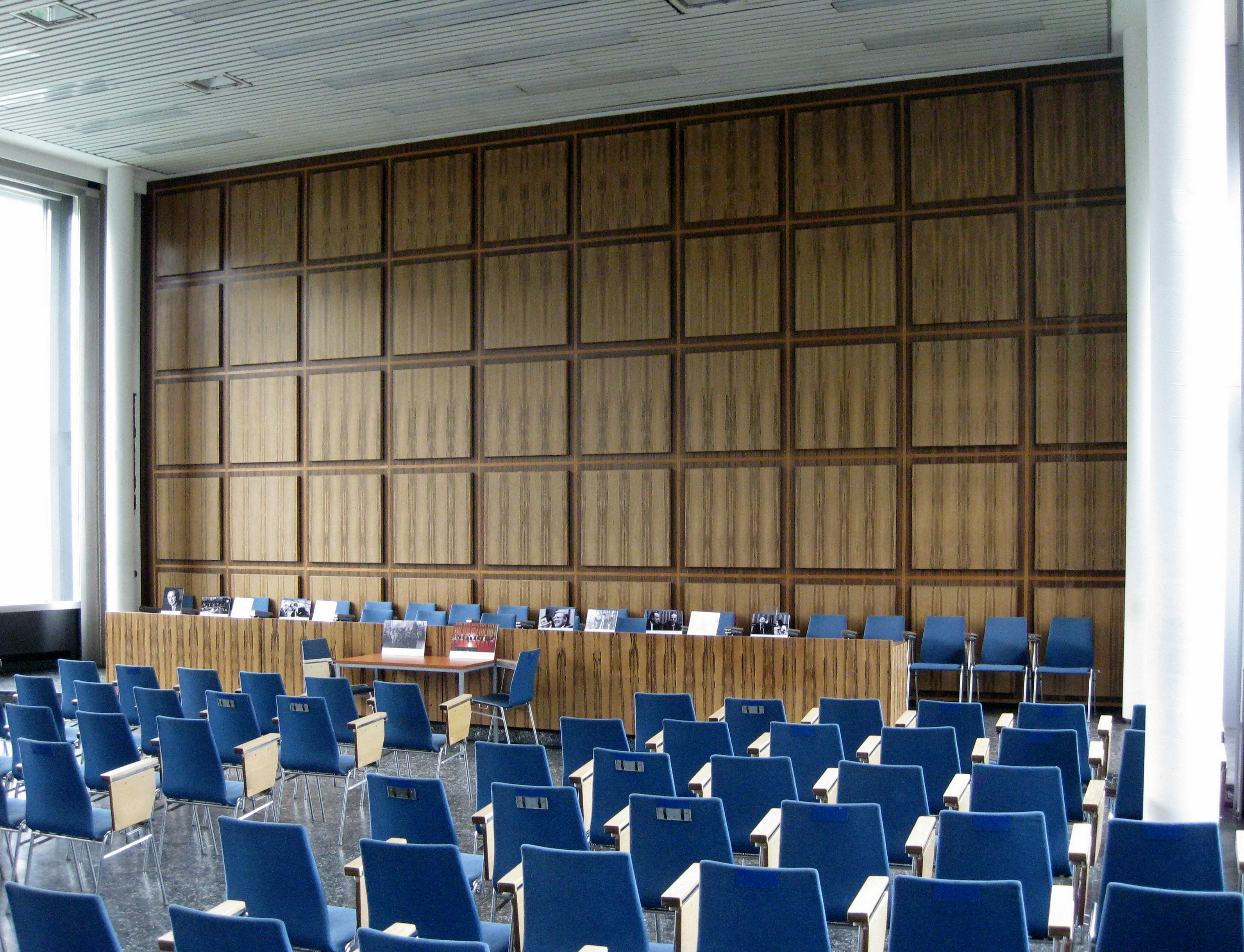 Saal der Bundespressekonferenz in Bonn, Tulpenfeld 7